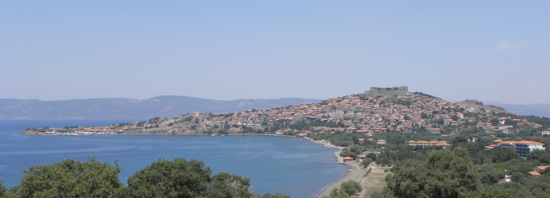 Celkový pohled na Mithymnu, Lesbos